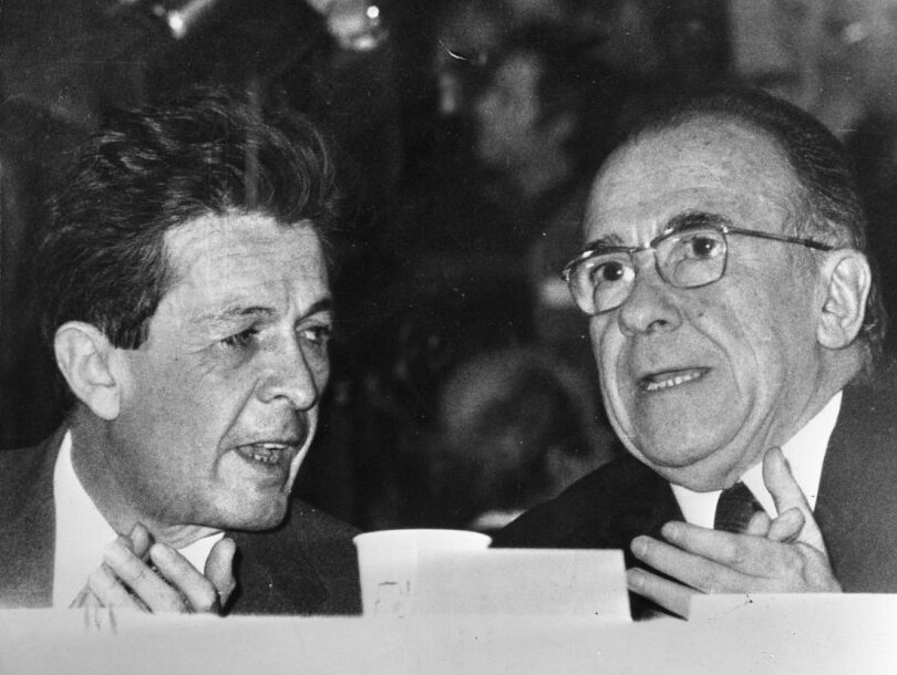 Santiago Carrillo (derecha) en 1976.